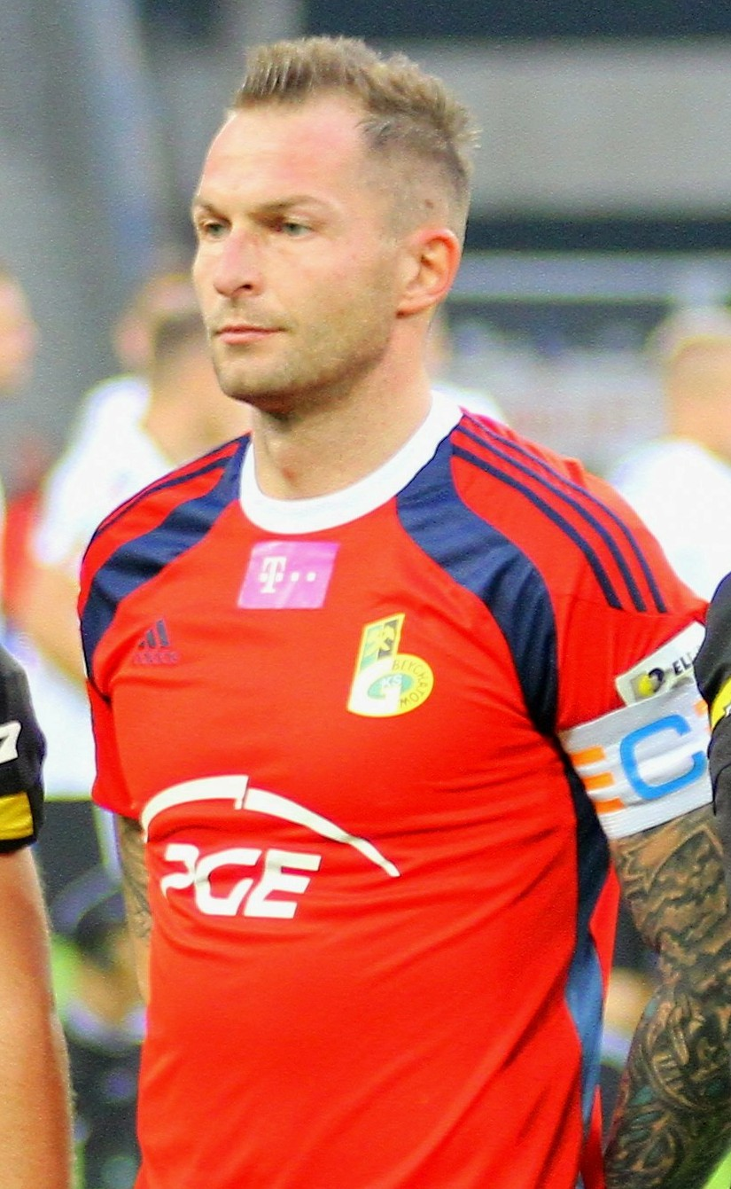 Arkadiusz Malarz w barwach GKS Bełchatów